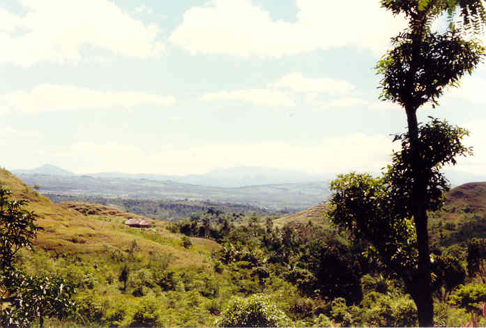 Westtimor in der Regenzeit, Landschaft bei Soe (Amanuban Barat)